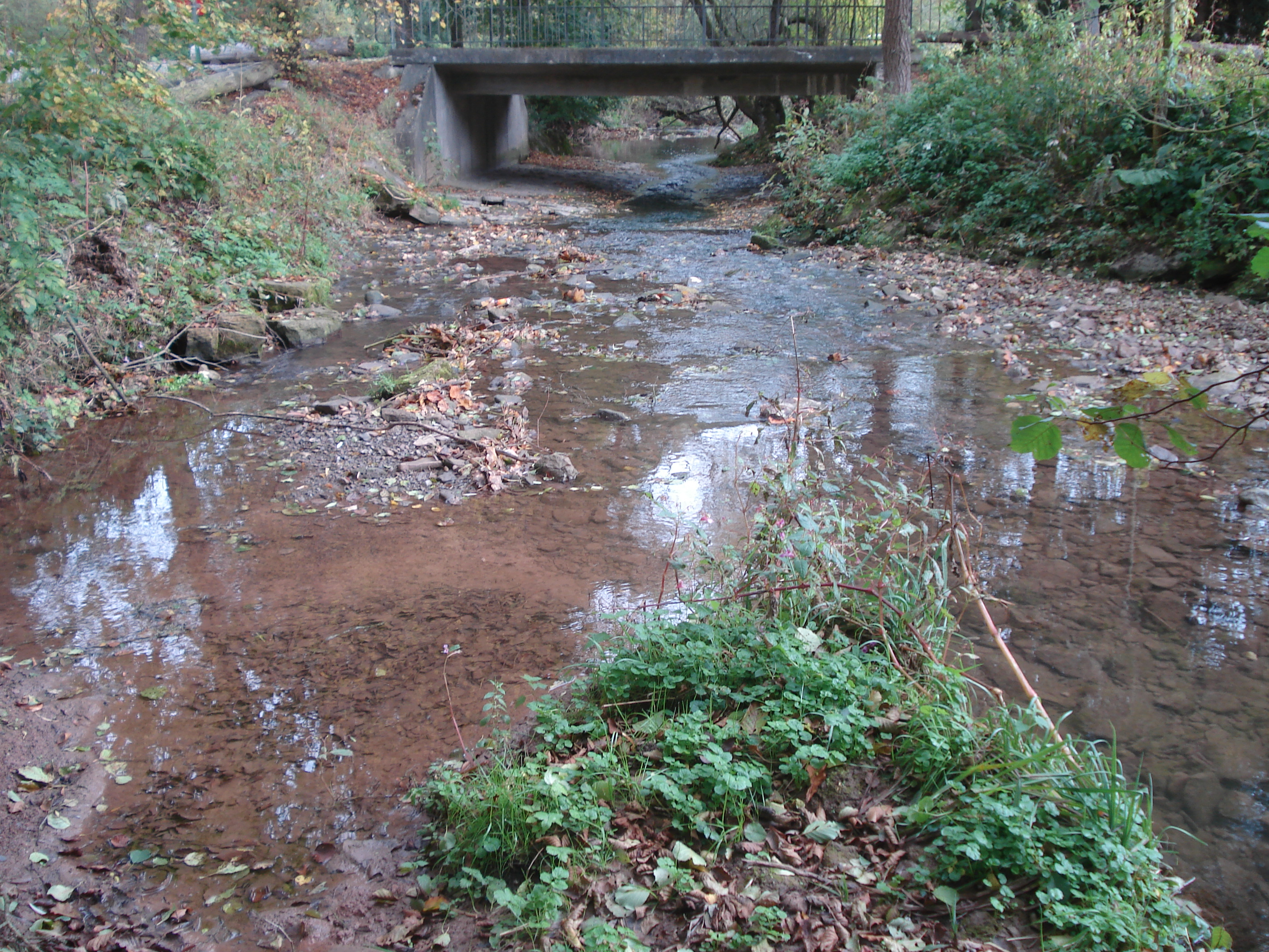 Der Hollerbach (vorne links) mündet in die Morre (von vorne rechts nach hinten)